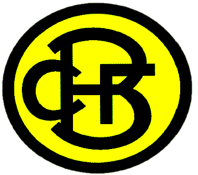 Logotipo do Caminho de Ferro de Benguela